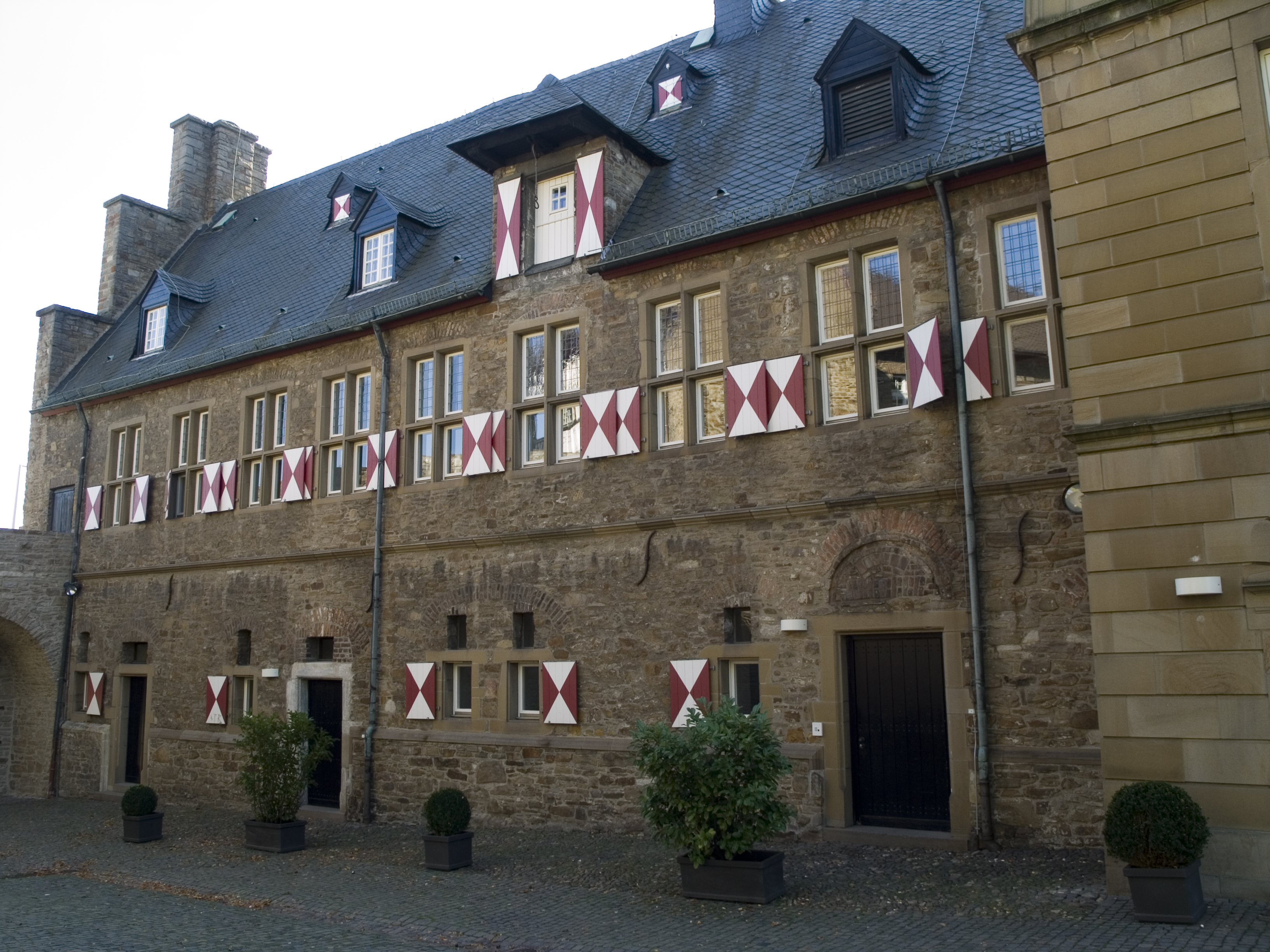 Северный Рейн-Вестфалия, Мюльхайм-на-Руре - замок Бройх